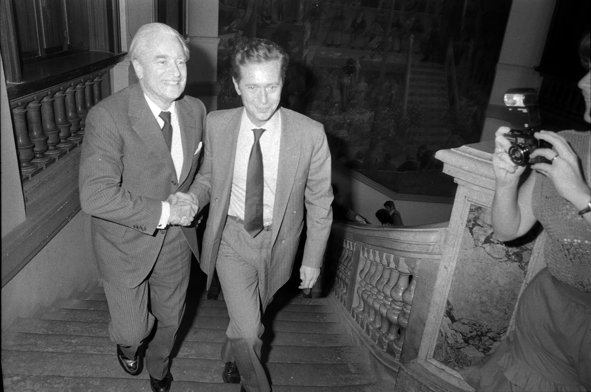 Le Capitole. Le 28 Mai 1985. Vue de Dominique Baudis et de Jacques Chaban-Delmas montant les marches du Capitole.